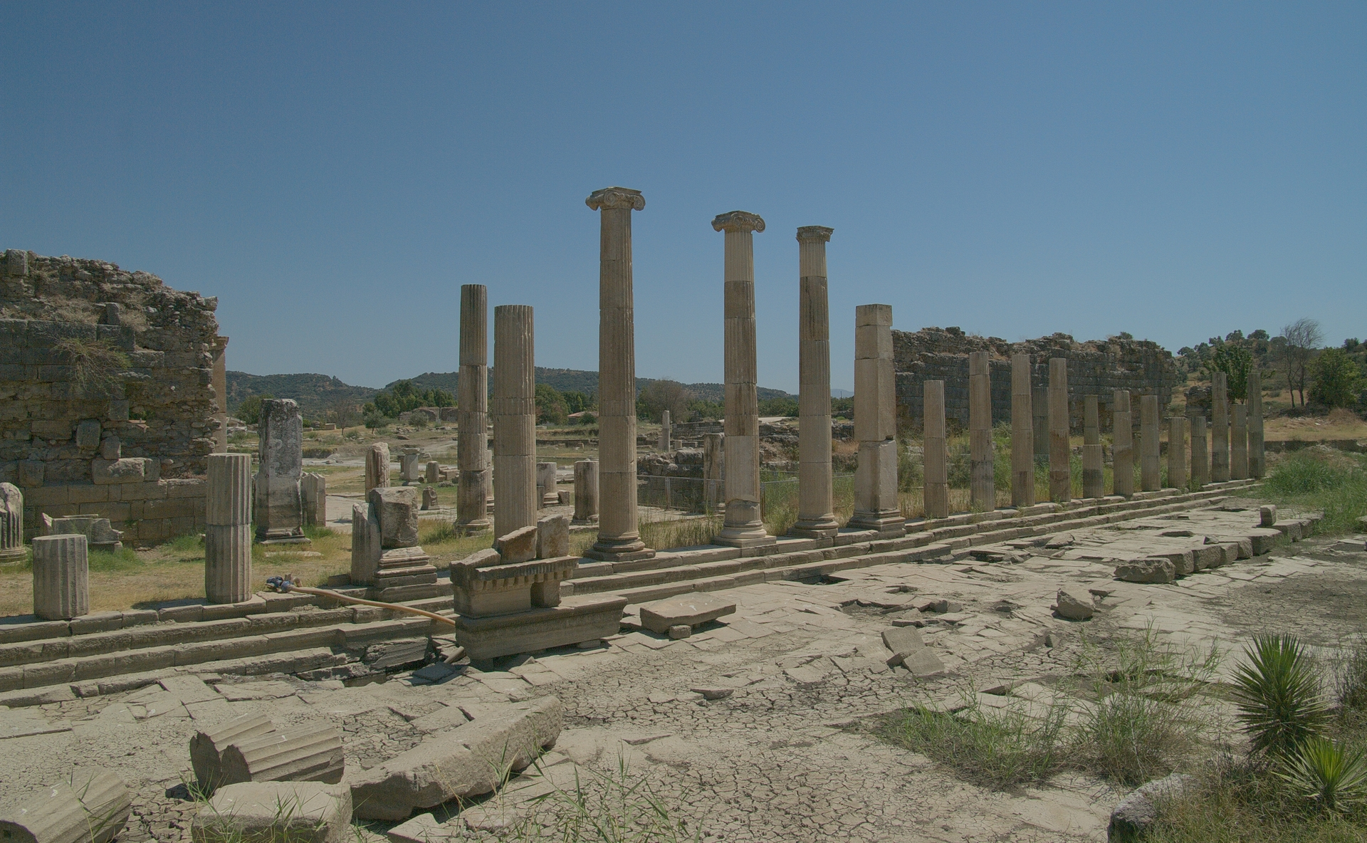 Магнесия на Меандре. Пропилеи